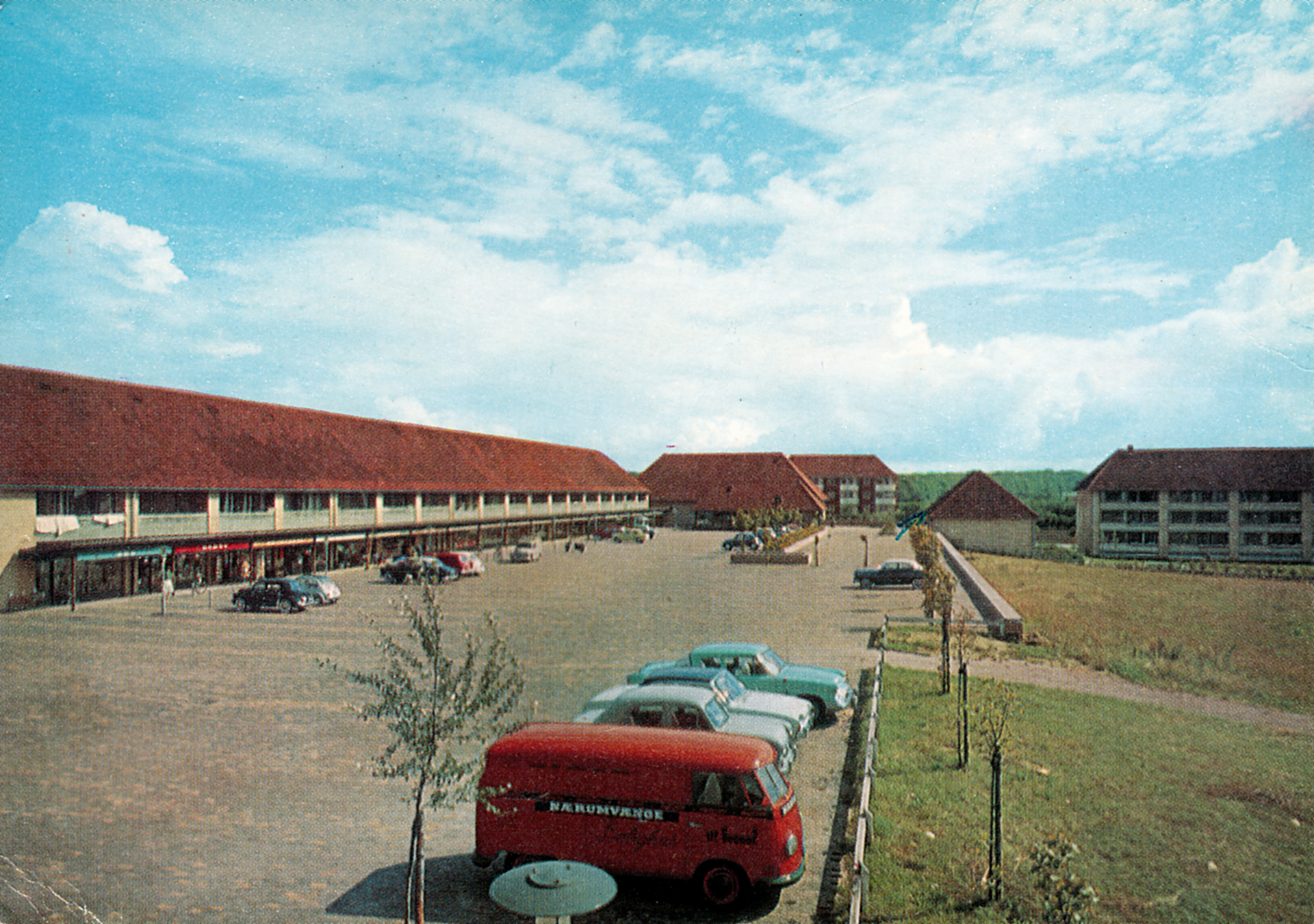 Nærumvænge Torv før supermarkedets tid. Nærum Stormarked blev åbnet 31. oktober 1958